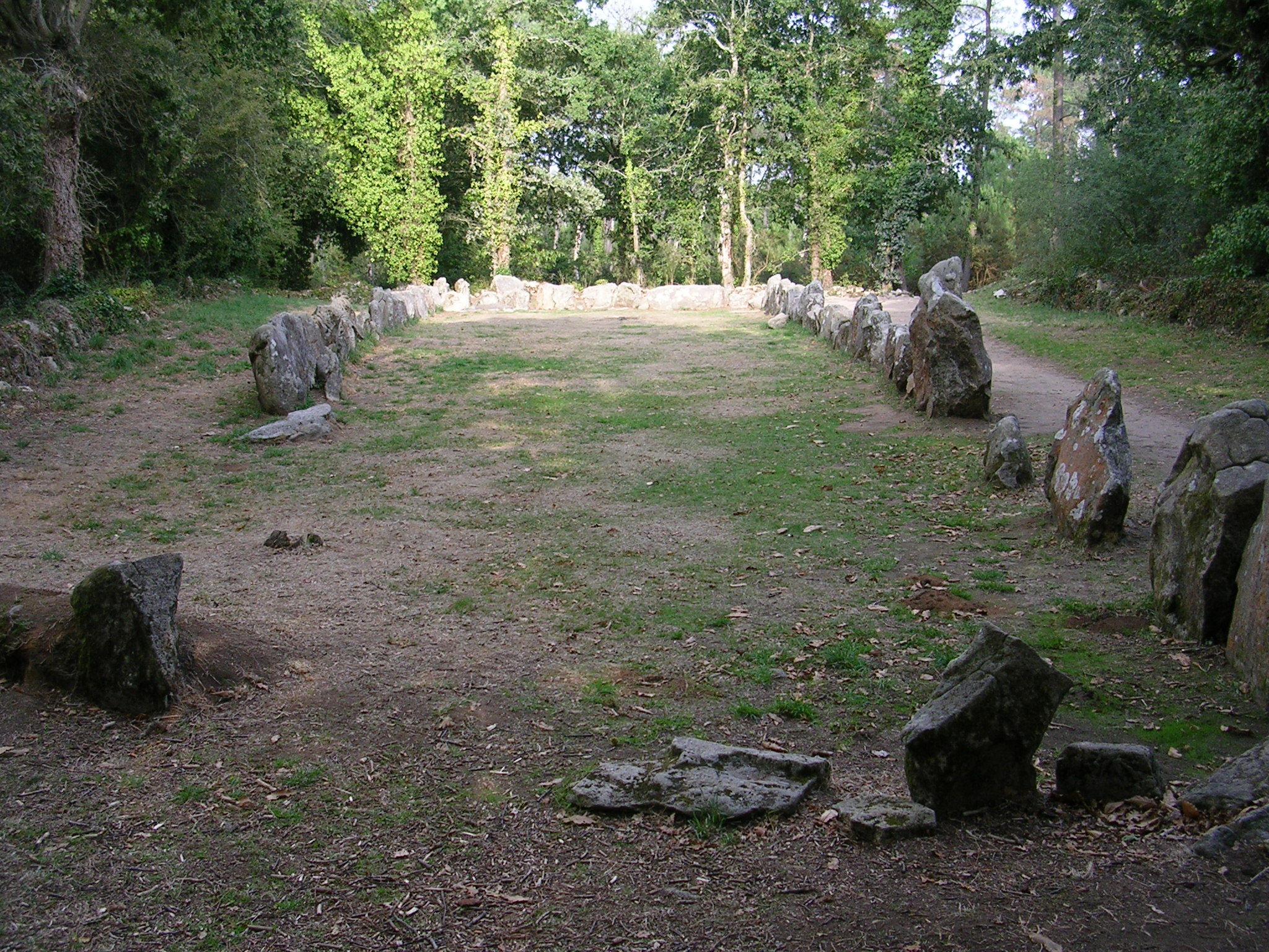 Tumulus, quadrilatère et menhir de Manio .